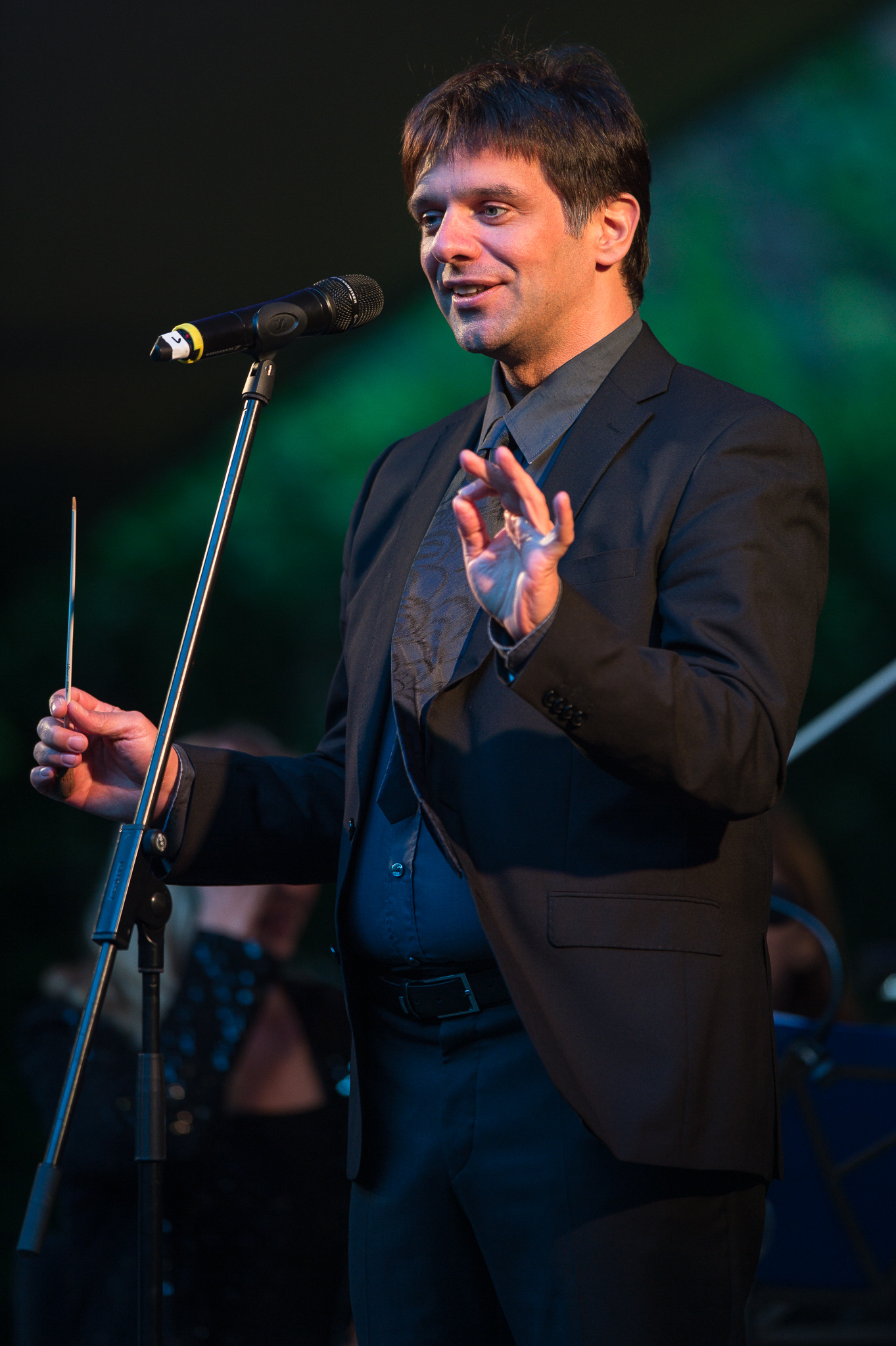 Concertbüro Franken,Klassik,Konzert,La Notte Italiana,Livekonzert,Livemusik,Markus Elsner,Musik,Serenadenhof